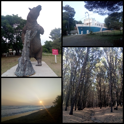 Collage de Pehuen Co, Coronel Rosales, Provincia de Buenos Aires, Argentina